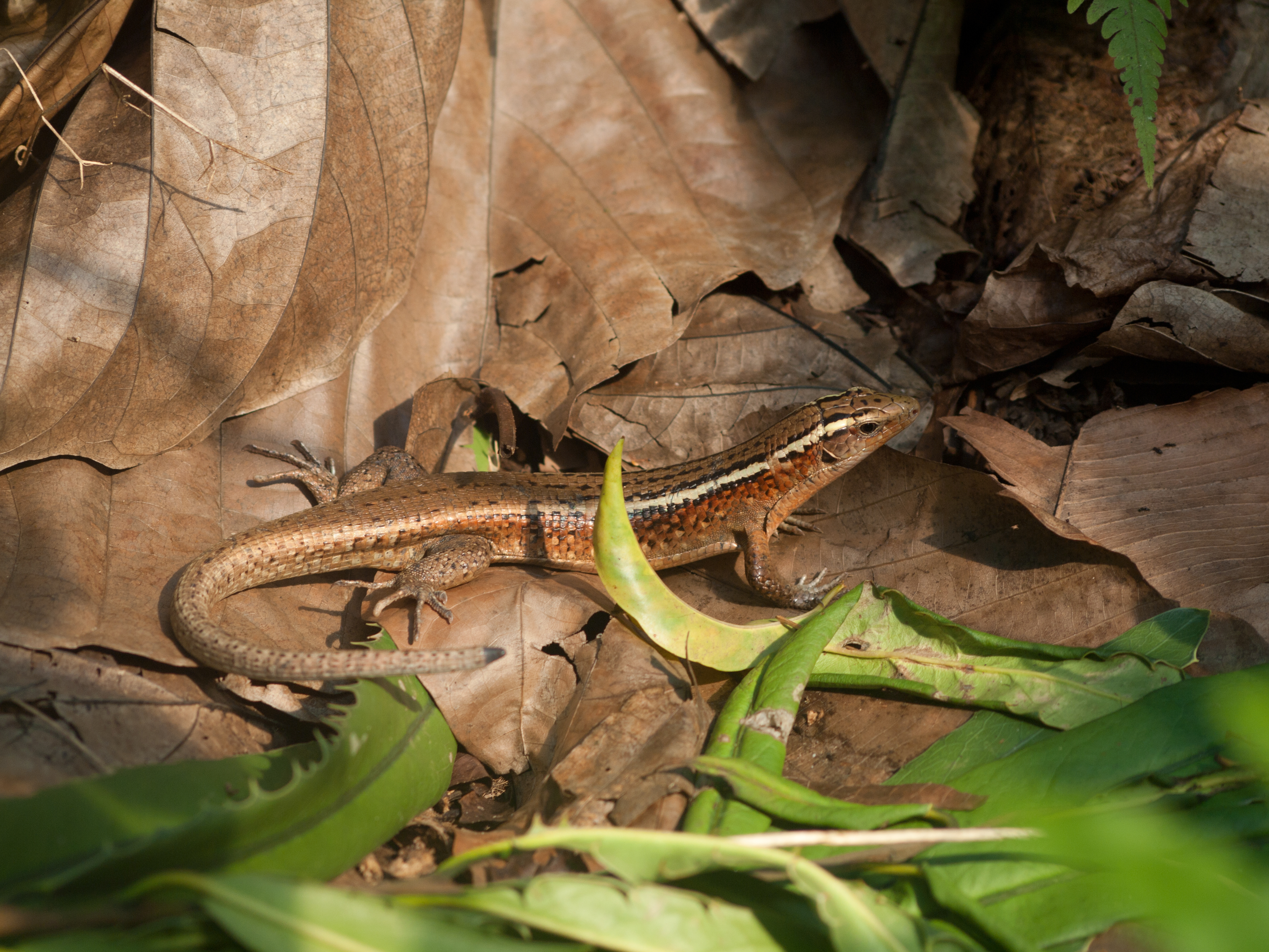 Madacarskar-Ringel-Schildechse. Aufgenommen in der Masoala-Halle im Zoo-Zürich